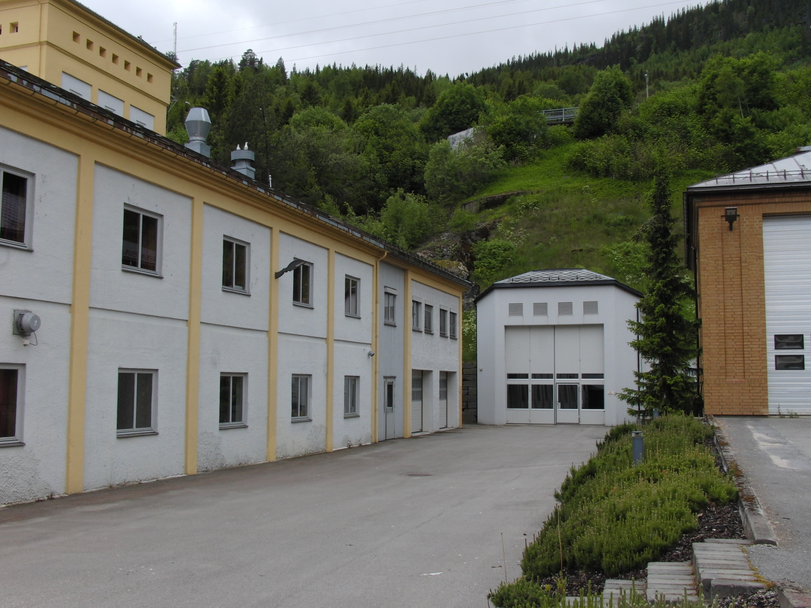 Follafoss nye kraftverk, portal